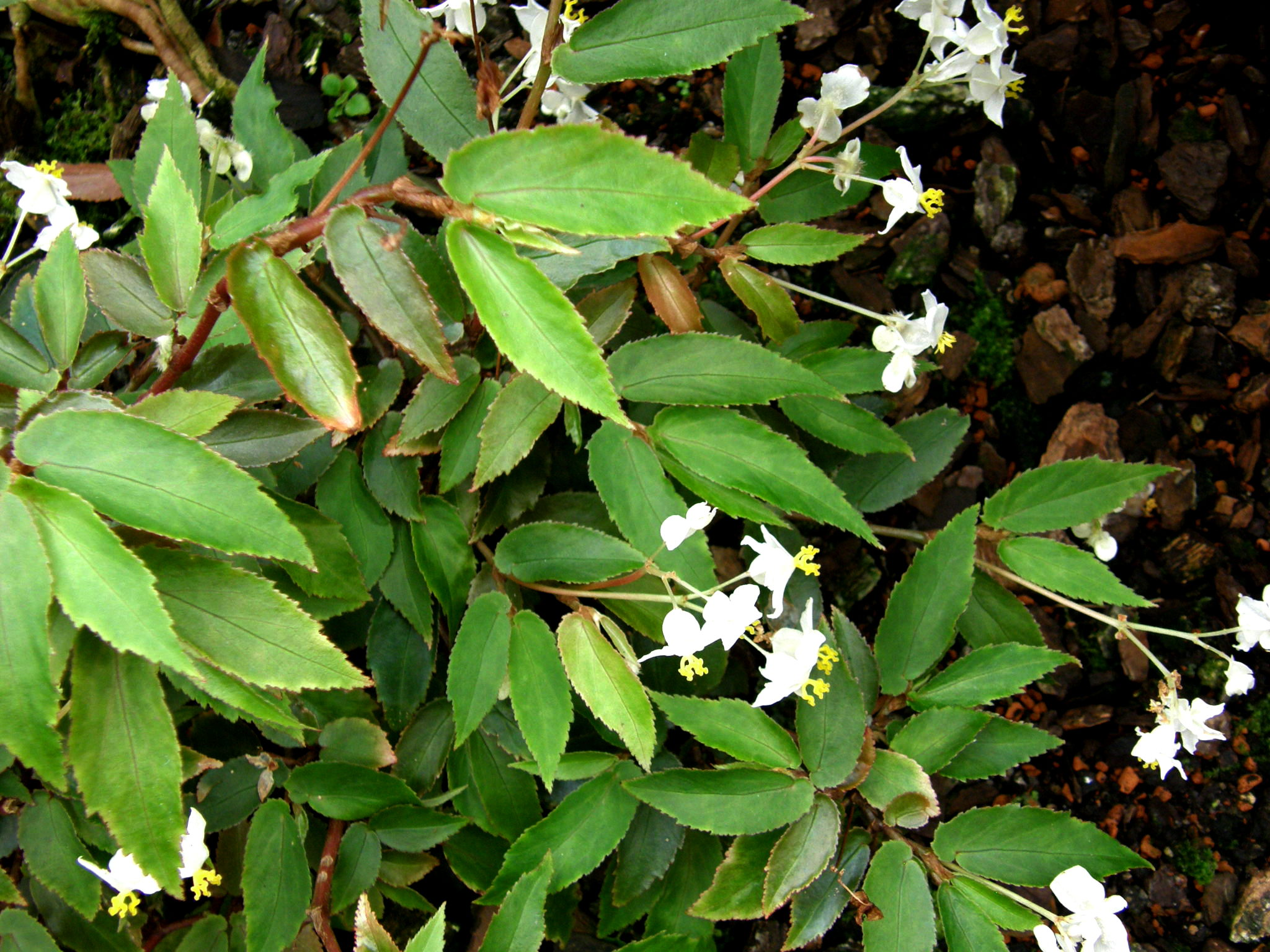 Begonia obscura Brade dans la serre du Botanischer Garten de Berlin-Dahlem